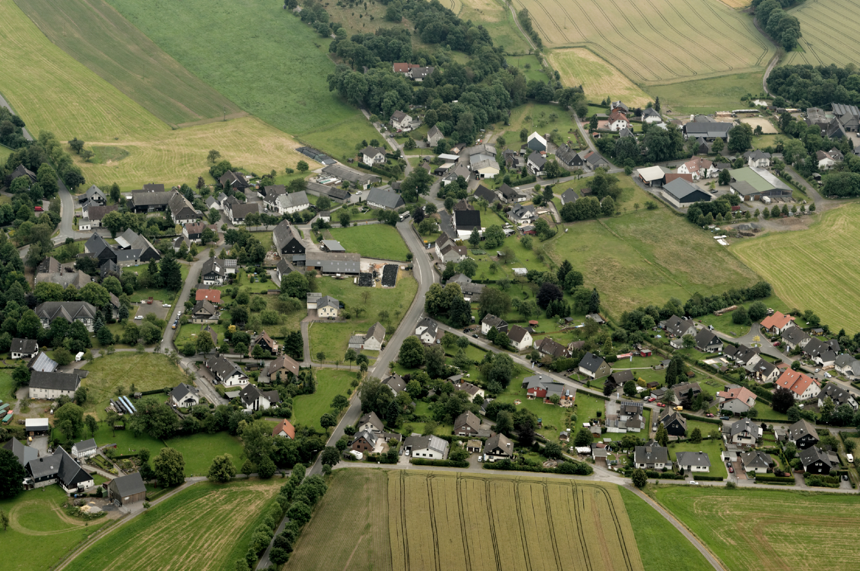 Fotoflug Sauerland Nord. Sundern-Altenhellefeld, Landesstraßen 839 und 840, Blickrichtung Ost The making of this document was supported by the Community-Budget of Wikimedia Germany.